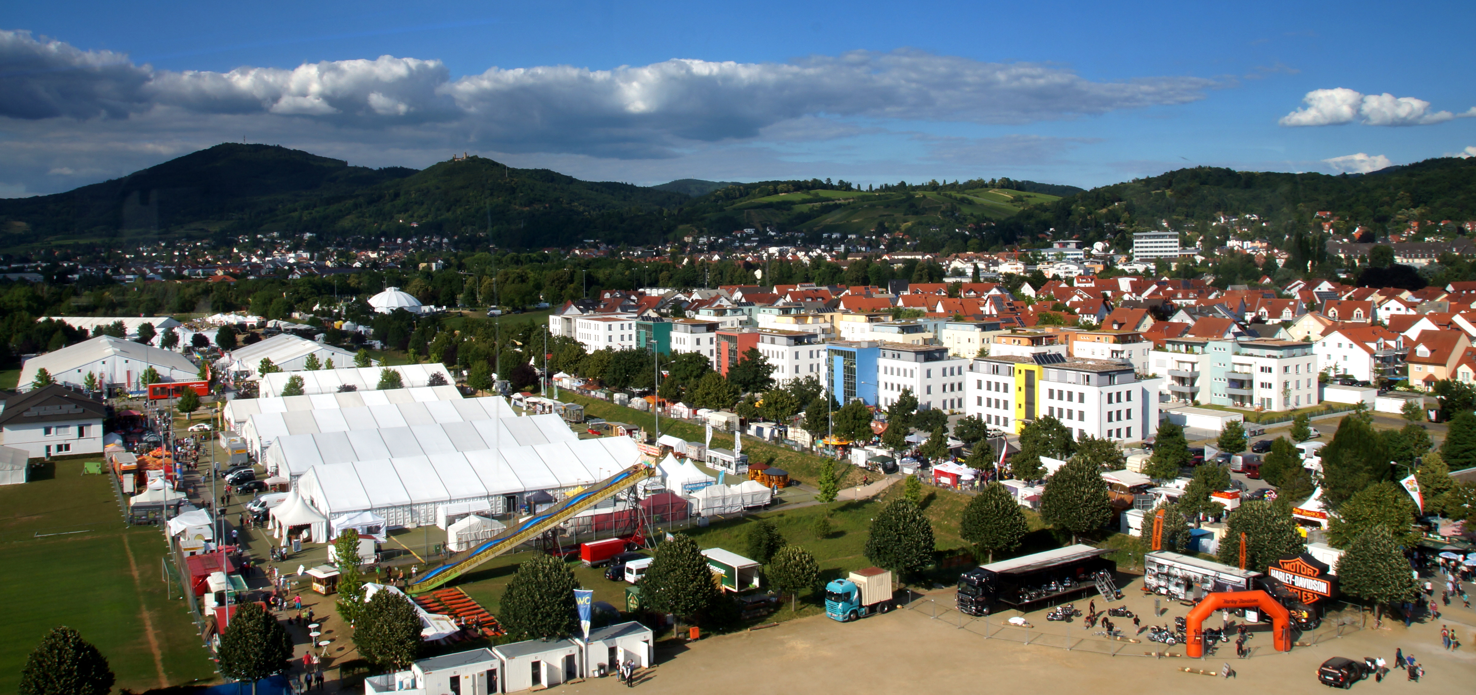 Bensheim am Hessentag von oben